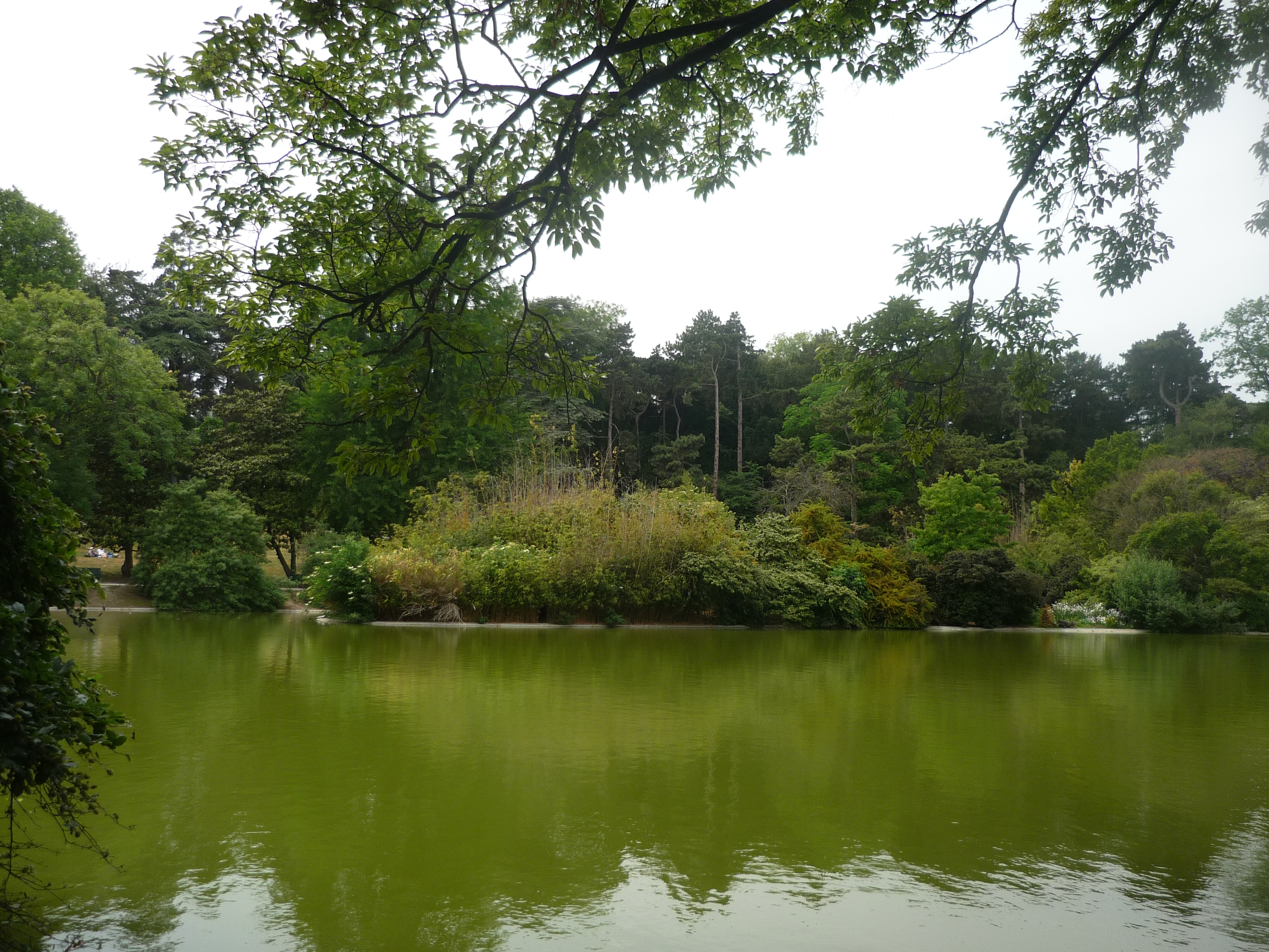 Le lac du parc Montsouris à Paris, vue sur l'île qui se trouve dans ce lac et n'est pas accessible au public.